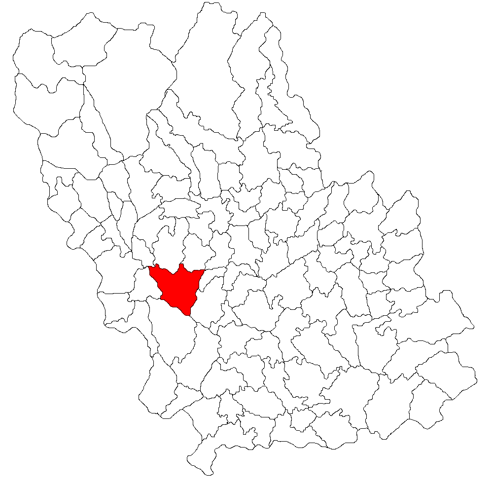 Categorie:Hărţi ale judeţului Prahova